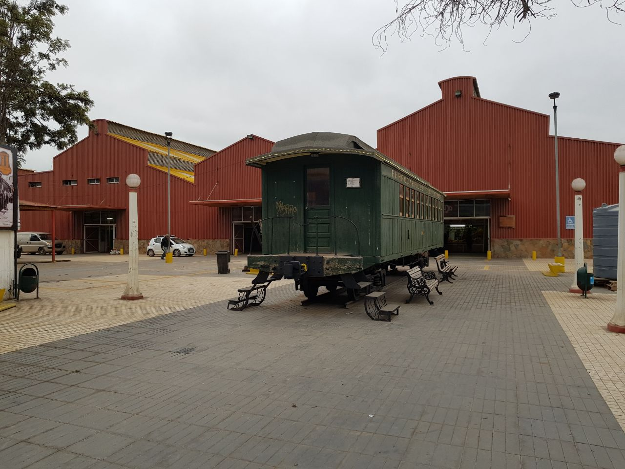 Acceso sur feria modelo